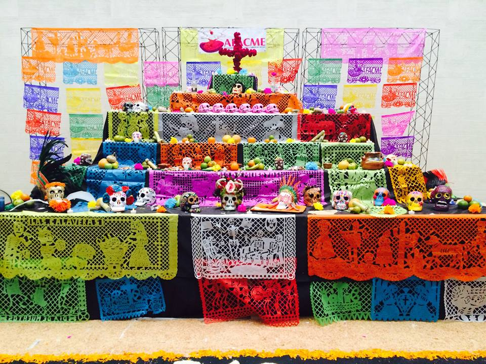 Foto de ofrenda típica mexicana en el Tec de Monterrey CCM. Esta ofrenda fue hecha por los alumnos de preparatoria del campus. En dicha ofrenda podemos observar elementos típicos com calavirtas de dulce, flores de cempasúchil, comida, veladoras, papel picado. Además se hizo bastante colorida para expresar la alegría que tienen los mexicanos por saber que un dia se reunirán con sus difuntos familiares.